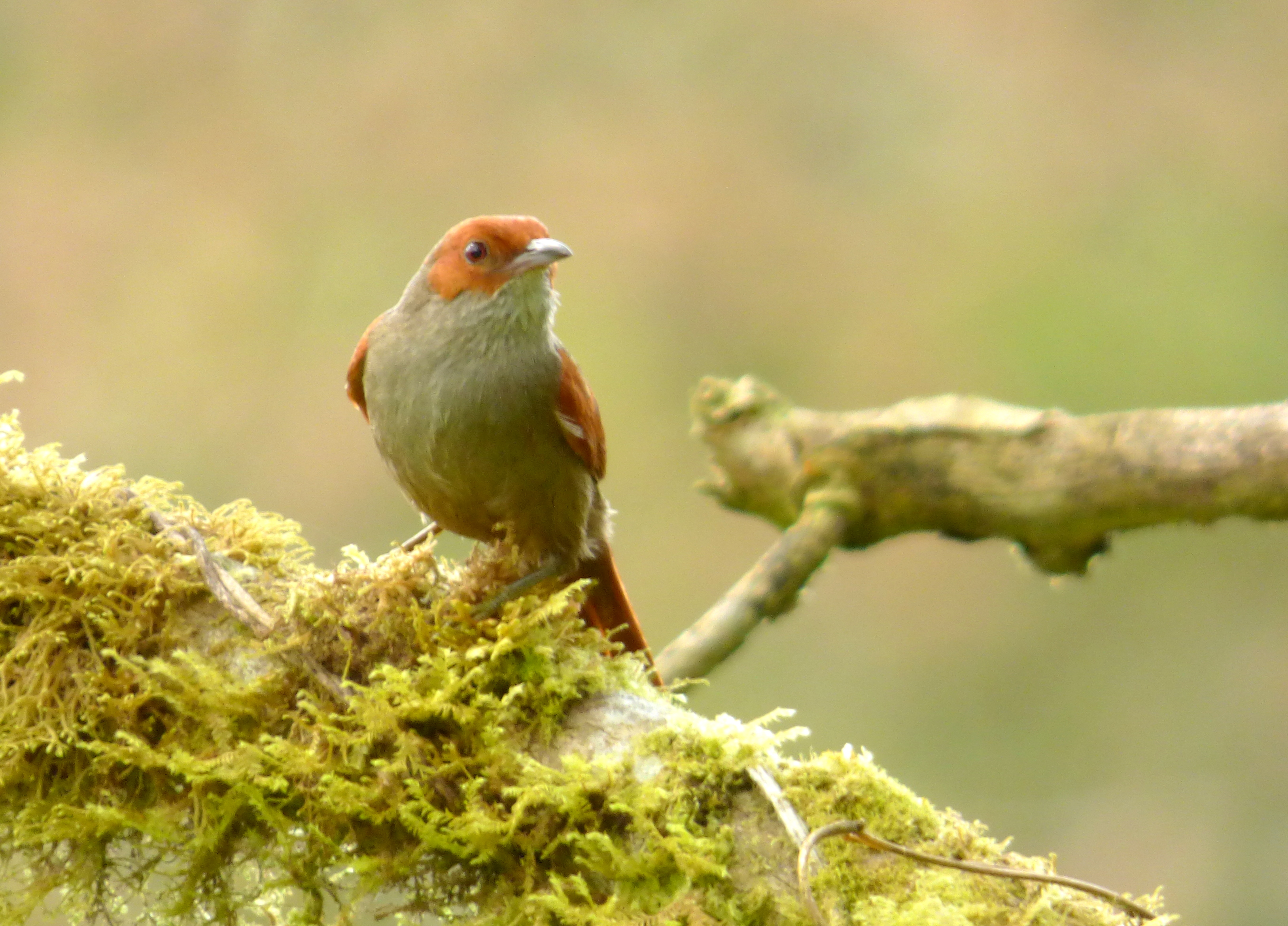 Cranioloeuca erythrops (Hojarasquero rubicundo)